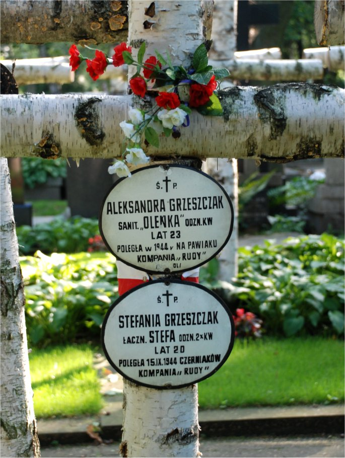 Nad mogiłą sióstr Aleksandry i Stefanii Grzeszczak, Powązki Wojskowe, Warszawa